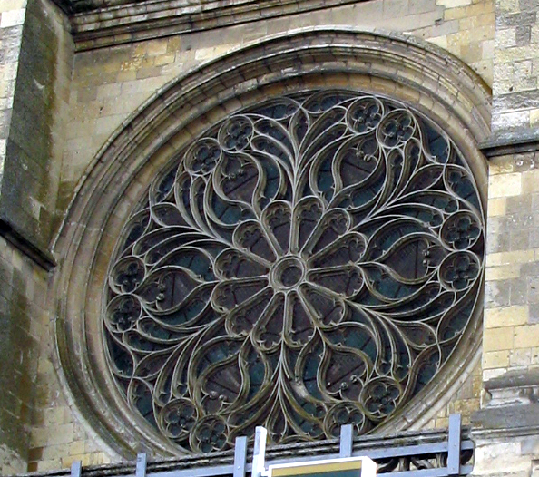 Corbie (Somme, France) - Abbatiale (Eglise St-Pierre). La rosace.